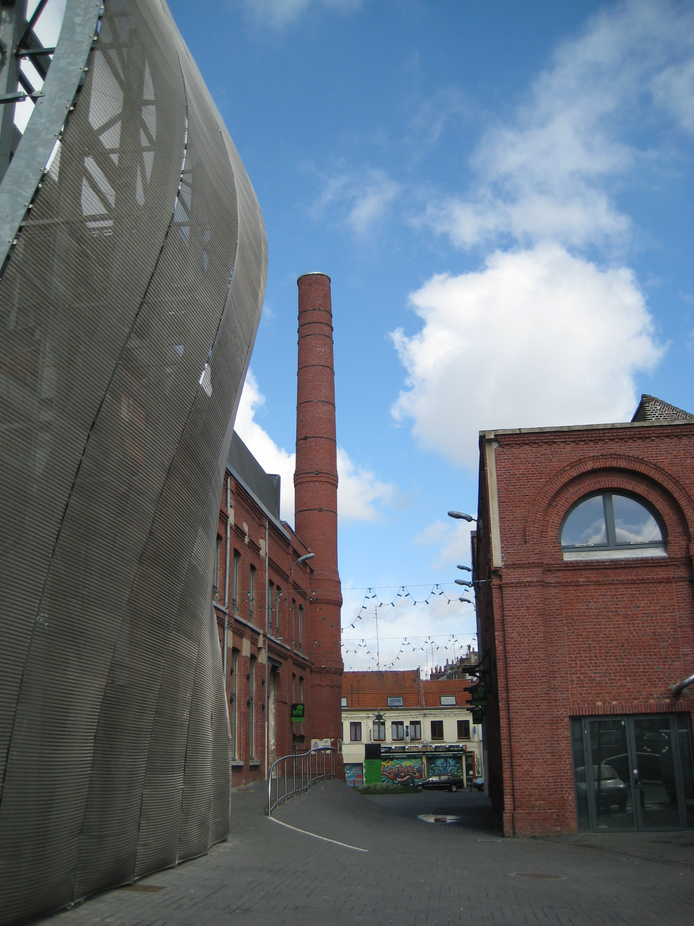 Maison folie de Wazemmes